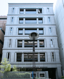 Morisaki_building